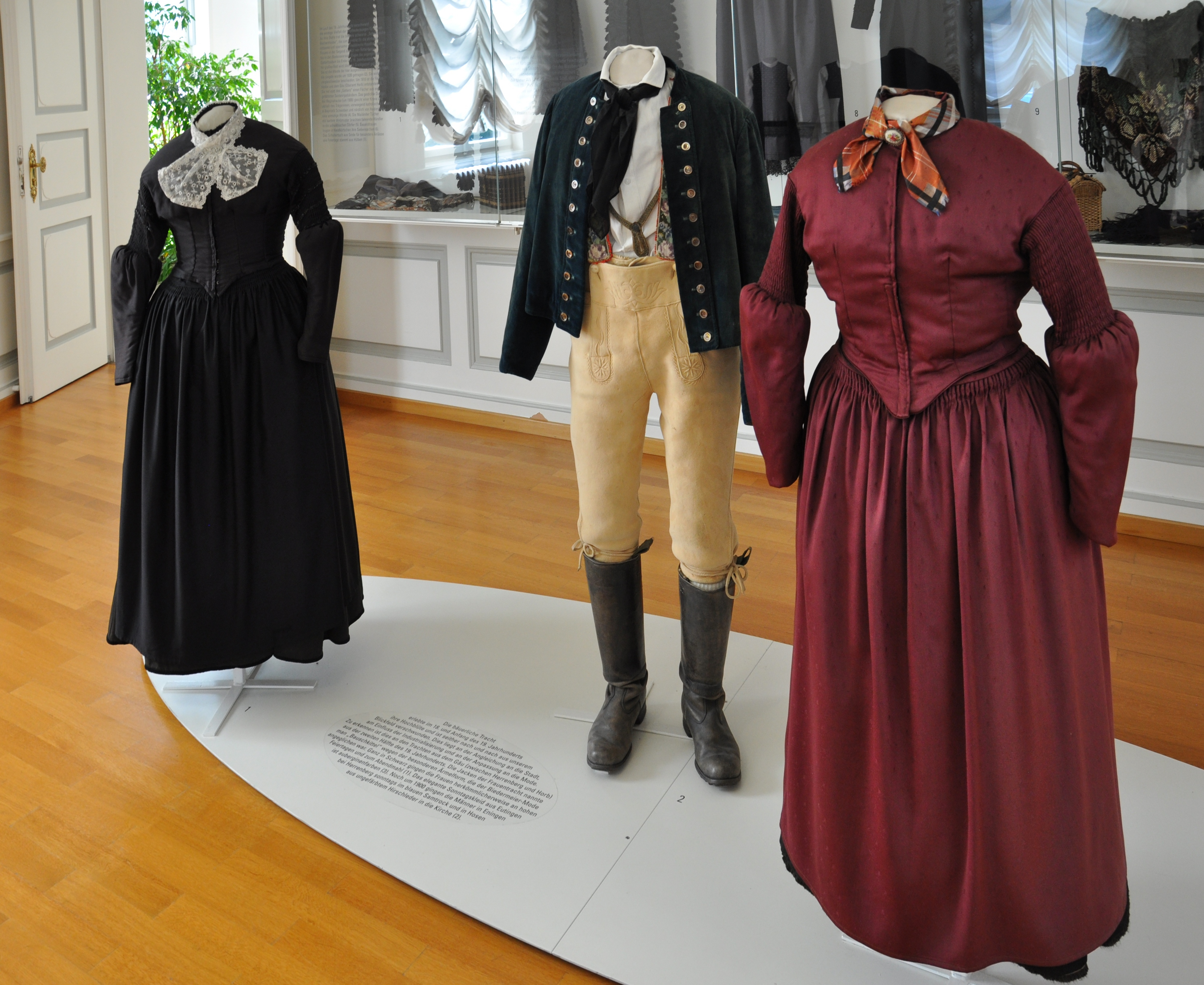 Bad Urach, Schloss Urach, Rondellzimmer, württembergische Trachten aus dem Gäu (zwischen Herrenberg und Horb), 2. Hälfte 19. Jahrhundert, von links nach rechts: Ganz schwarze Frauentracht mit „Bauschkittel“, getragen an hohen Feiertagen und zum Abendmahl Sonntagstracht der Männer aus Ehningen bei Herrenberg (blauer Samtrock, Hosen aus ungefärbtem Hirschleder), bis um 1900 Auberginefarbenes Sonntagskleid aus Eutingen